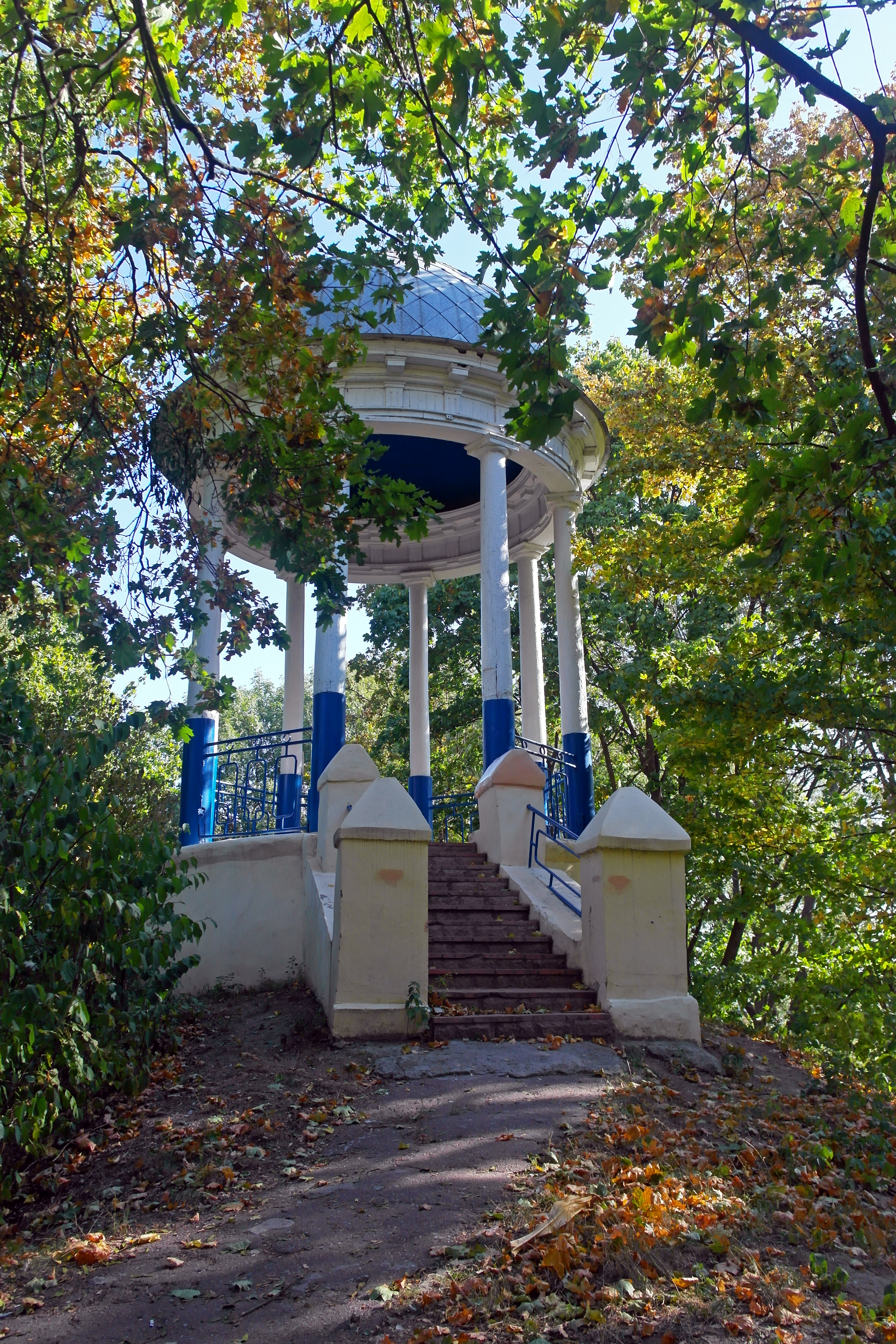 Парк-пам'ятка садово-паркового мистецтва загальнодержавного значення «Кагарлицький», Кагарлик, вул. Паркова